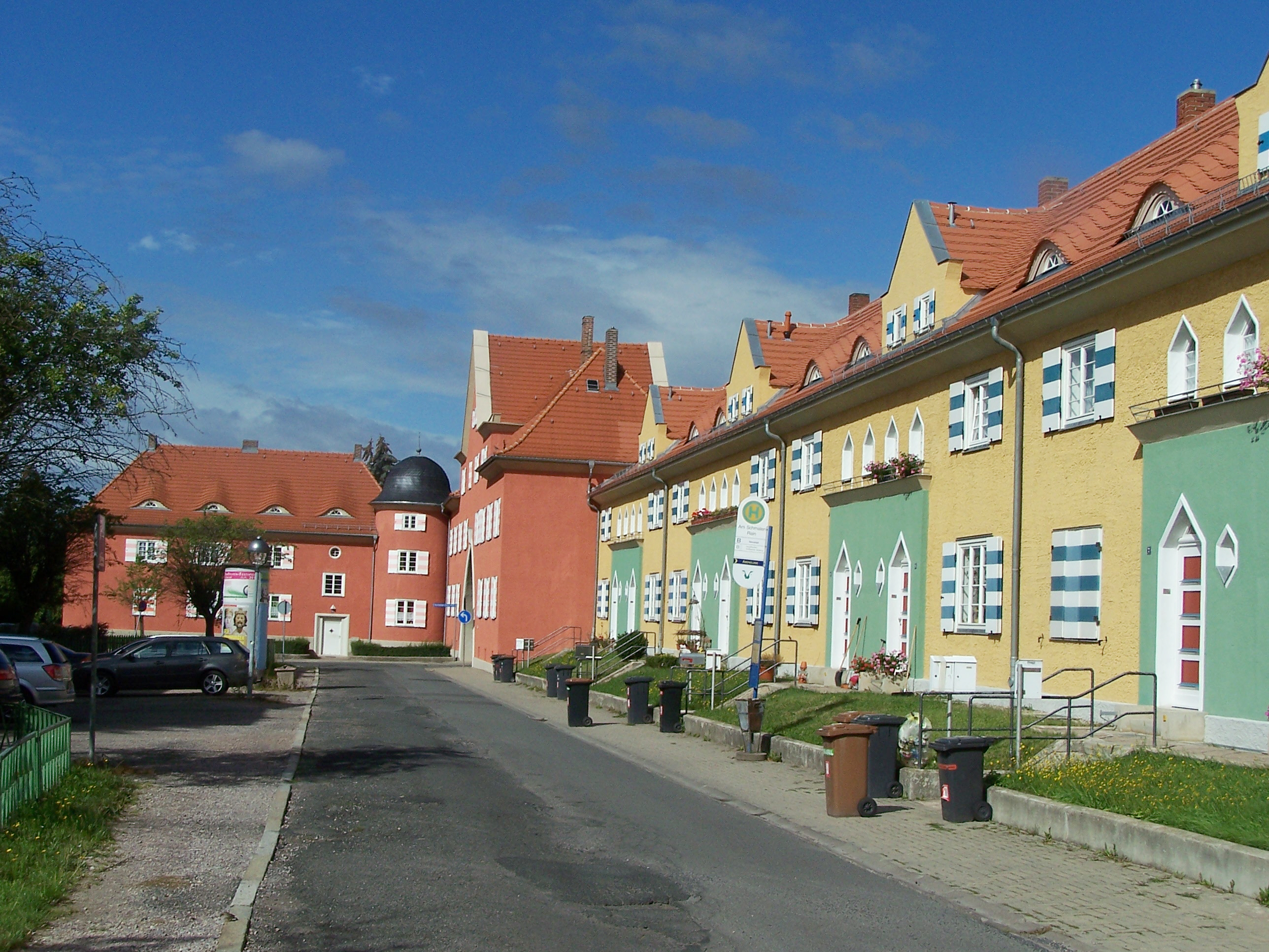 Teilansicht der Gartenstadt "Am Schmalen Rain" (Gotha).